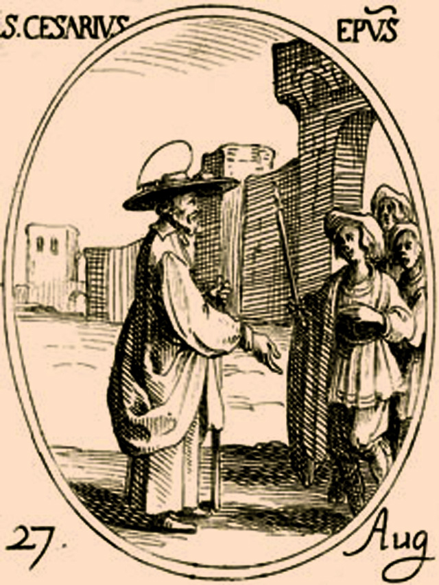 Cesaire, archevêque d'Arles, primat des Gaules, confie à sa soeur Césaria la communauté de religieuses qui va s'installer à Notre-Dame-de-la-Barque, aujourd'hui Saintes-Maries-de-la-Mer